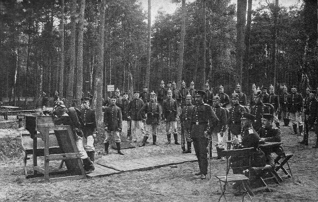 Schießstände im Neustädter Holz Transferred from de.wikipedia to Commons by Kekator using CommonsHelper.